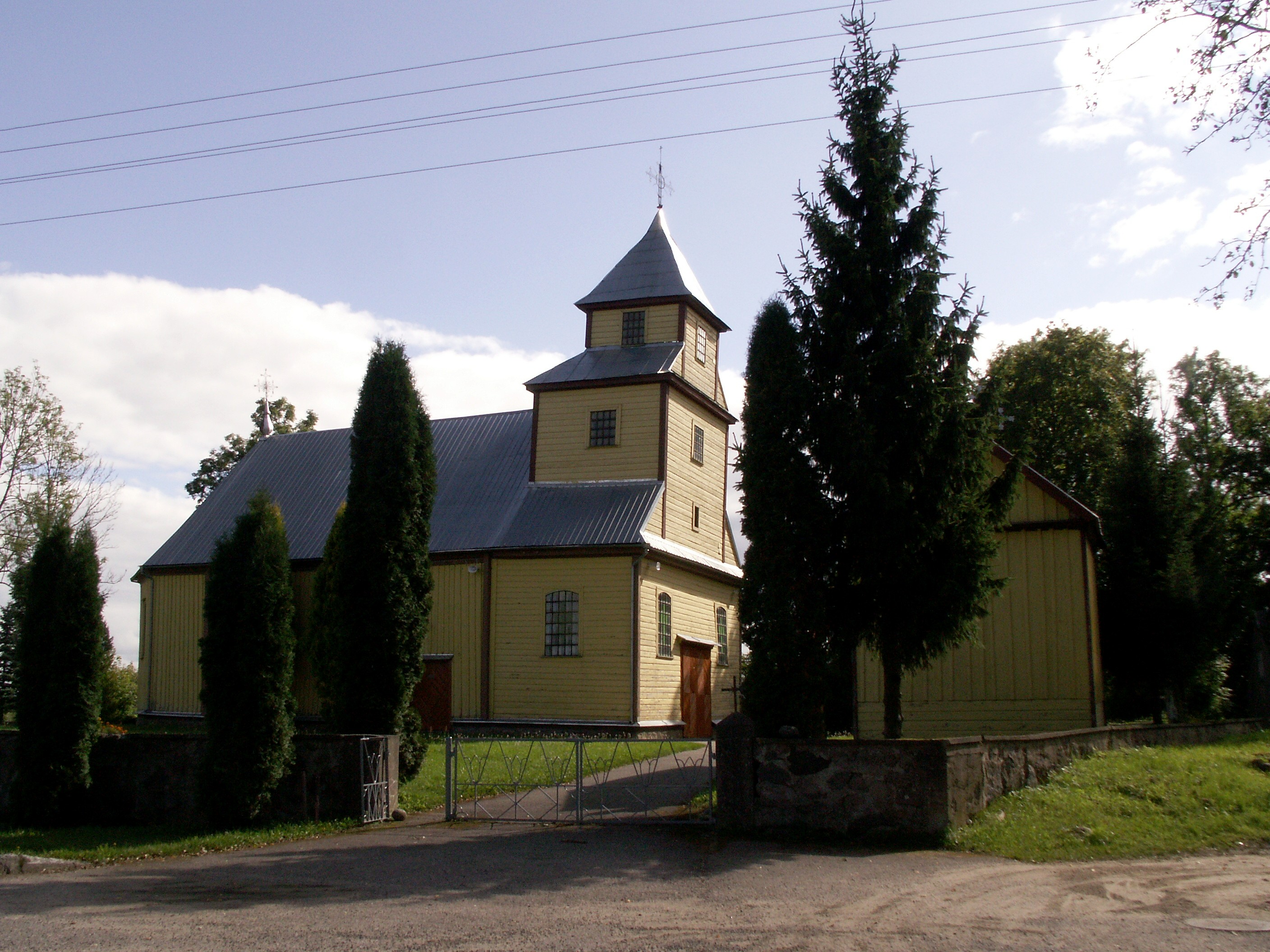 Požėrė, Šilalės rajonas, Lietuva